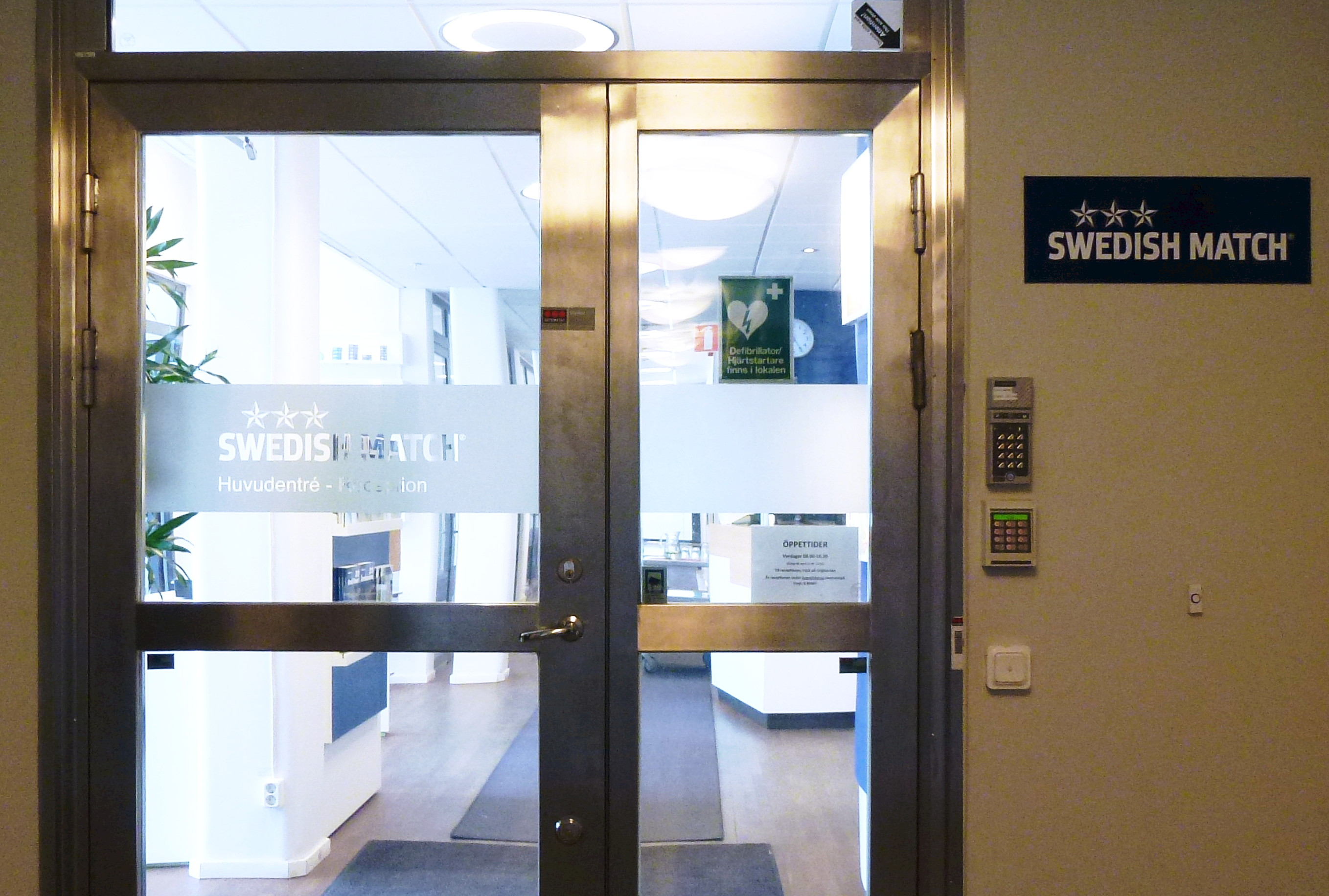 Swedish match kontor i gamla fabriken, Tobaksmonopolet 2.